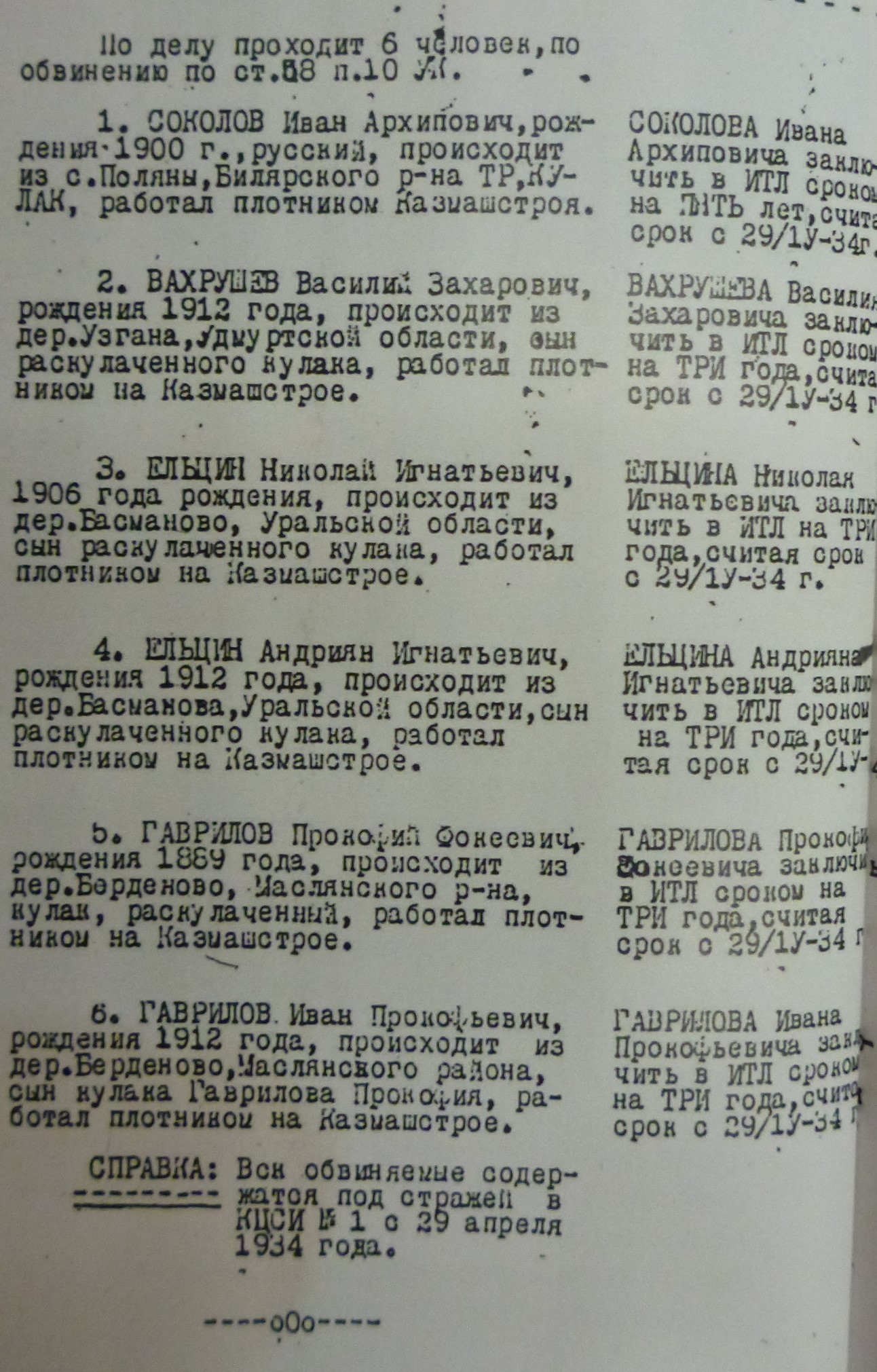 Выписка из протокола № 12 заседания судебной тройки Полномочного представительства ОГПУ Татарской АССР, Казань 23 мая 1934 года об в том числе Андрияна и Николая Игнатьевичей Ельциных. Копия хранится в Стэнфордском университете в США в архиве Дмитрия Волкогонова, опубликована в: Дилетант. - 2020. - № 54. - С. 64 - 65.